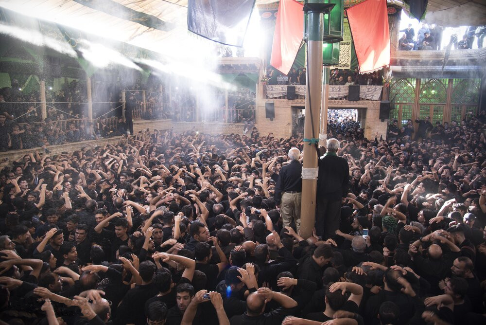 آئین سنتی «یا عباس یا عباس» در شاهرود